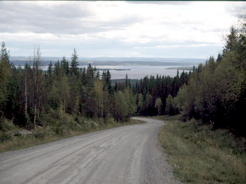 Der Fäbodvägen in Jämtland, Schweden mit Blick auf den Storsjön; the Fäbodvägen in Jämtland, Sweden with view over the lake Storsjön